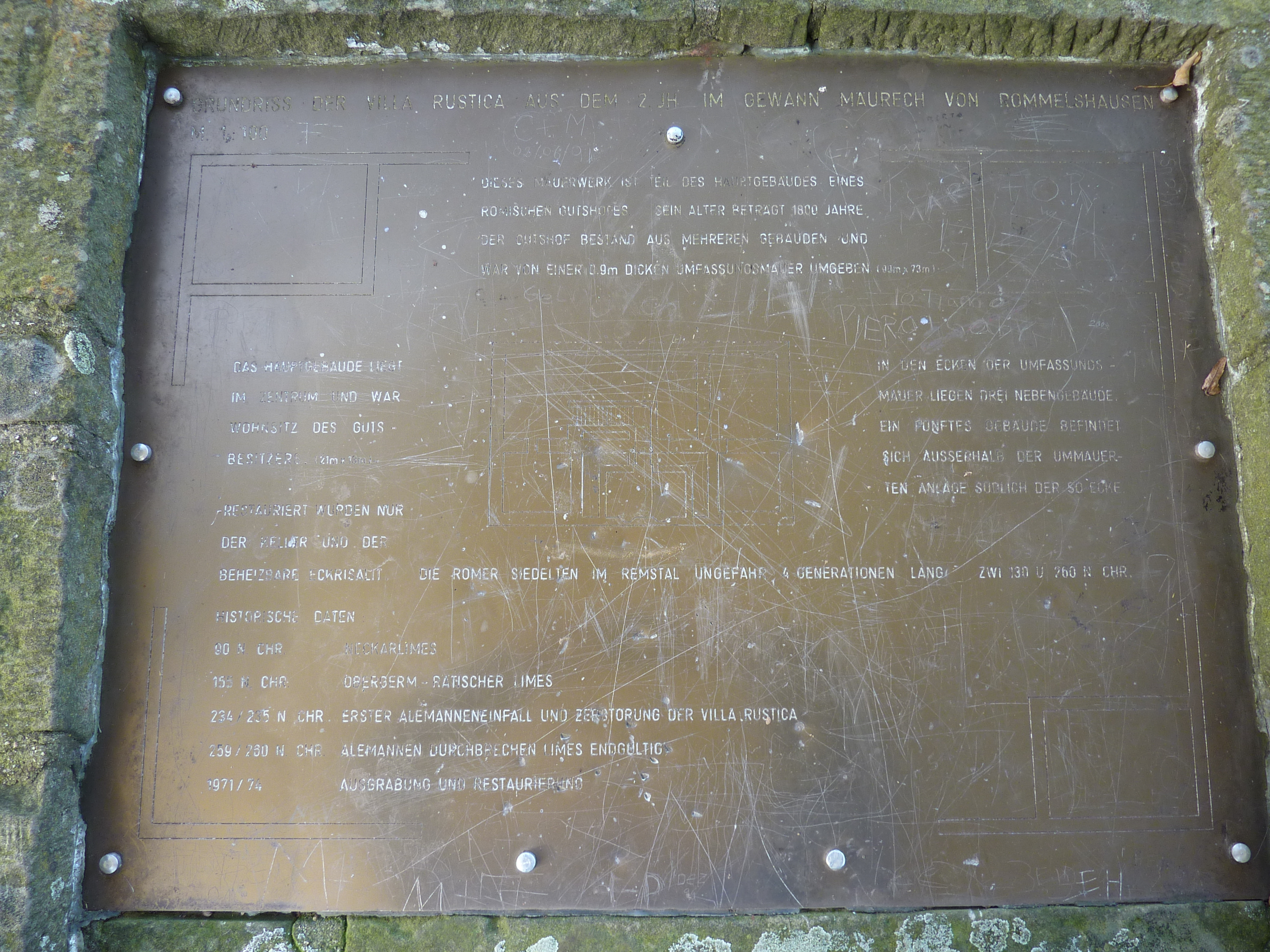 Infotafel bei der Villa rustica in Rommelshausen